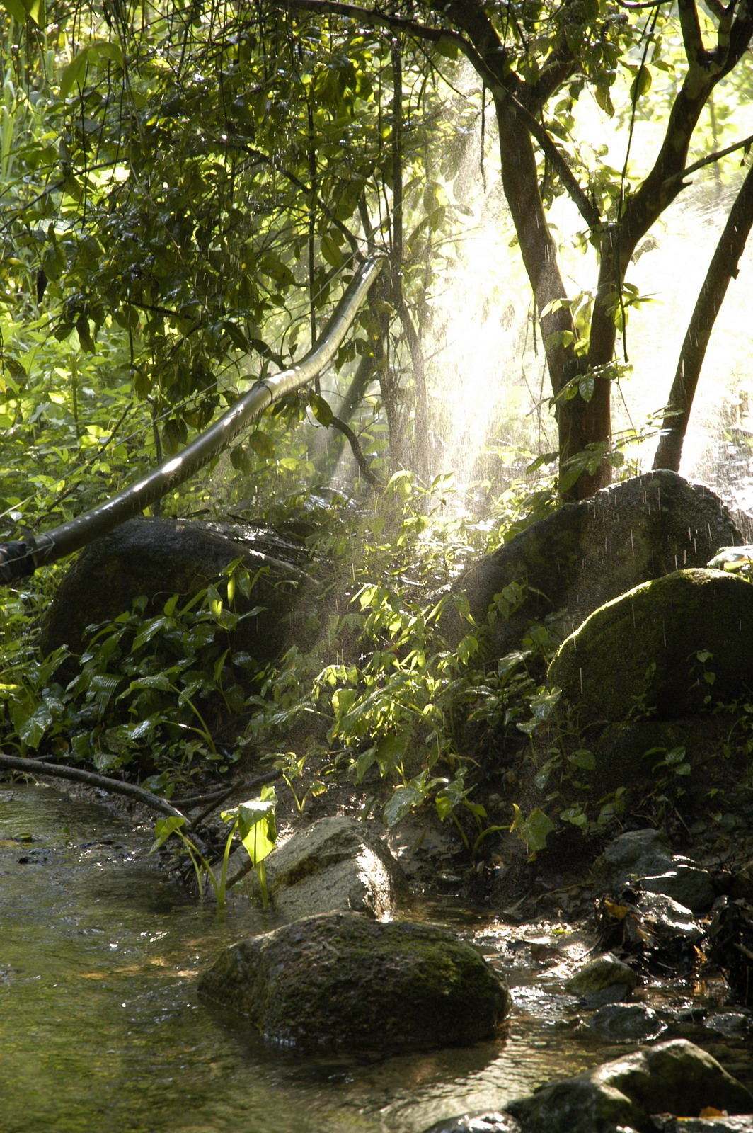 Sierra Madre - inside of jungle Autor: Perojevic